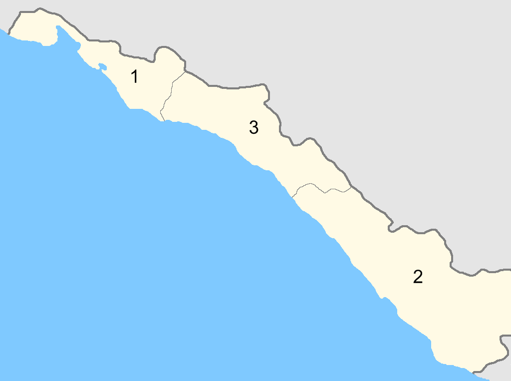 Карта административного деления Черноморской губернии